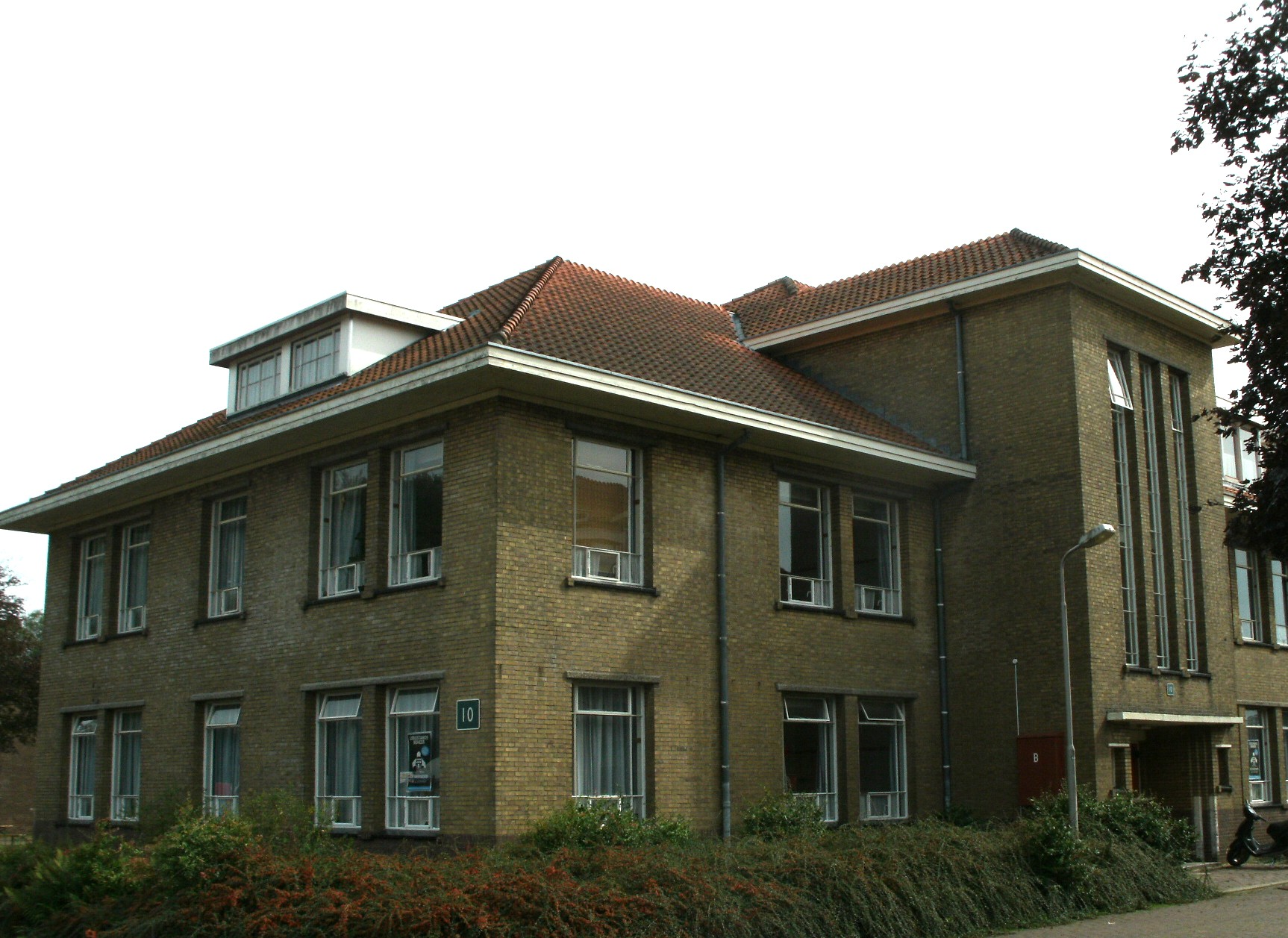 Legeringsgebouw 7 Elias Beeckmankazerne